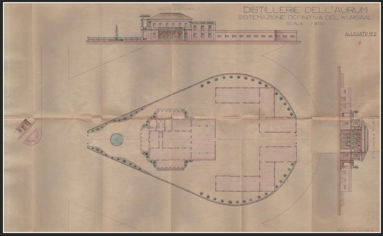 Planimetria su scala 1:200 dello stabilimento Aurum prima dei lavori di ristrutturazione ed ampliamento, Pescara 26 settembre 1938 (AS Pescara, Archivio storico Comune di Pescara, b. 1417, fasc. 7, allegato n. 2)